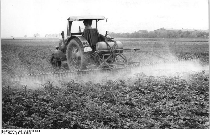 LPG Groß-Rosenberg, Insektenbekämpfung Zentralbild Biscan 5.6.1958 Moderne Pflegegeräte für unsere Landwirtschaft. Ein Erfahrungsaustausch über die Pflegearbeiten vereinte in Gross-Rosenberg, Kreis Schönebeck, Genossenschaftsbauern, werktätige Einzelbauern, Traktoristen und Landmaschinentechniker am 5.6.1958 zu einer Aussprache über Arbeitsmethoden und neue Maschinen. UBz: Traktorist Dieter Wiederhold vom Stützpunkt Breitenhagen der MTS Zuchau führte das neue Spritzgerät S-084 vor, das zur Unkraut- und Schädlingsbekämpfung verwendet werden kann. Das Gerät hat eine Arbeitsbreite von 8 Metern und ist unmittelbar an den Traktor RS 14-30 angebaut, hat keine eigenen Räder und hinterlässt somit keine Spur. Das Aggregat beim Einsatz auf einem Kartoffelfeld der LPG "Frohe Zukunft" in Gross-Rosenberg, Kreis Schönebeck.